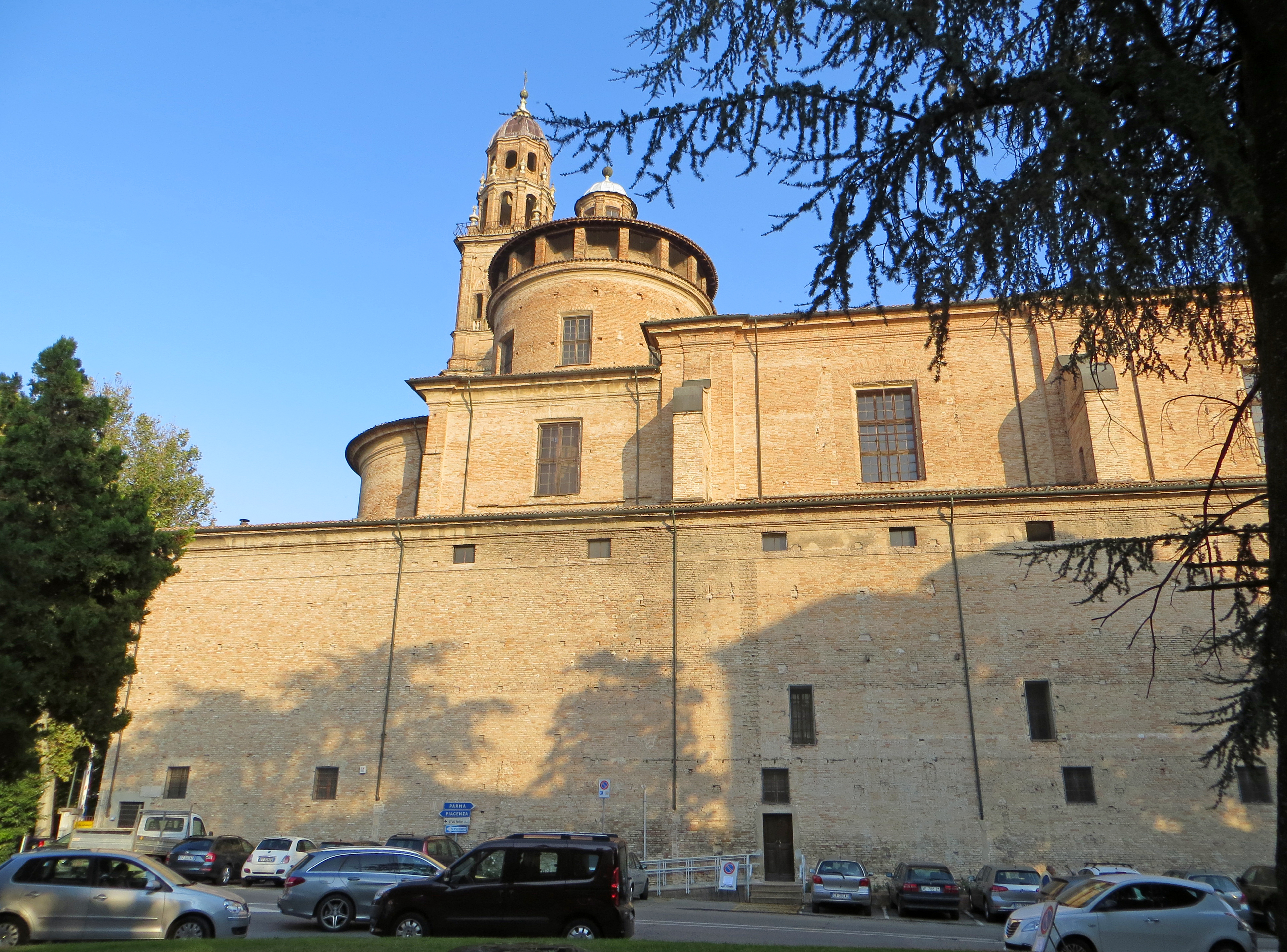 Santuario della Gran Madre di Dio (Fidenza) - lato ovest